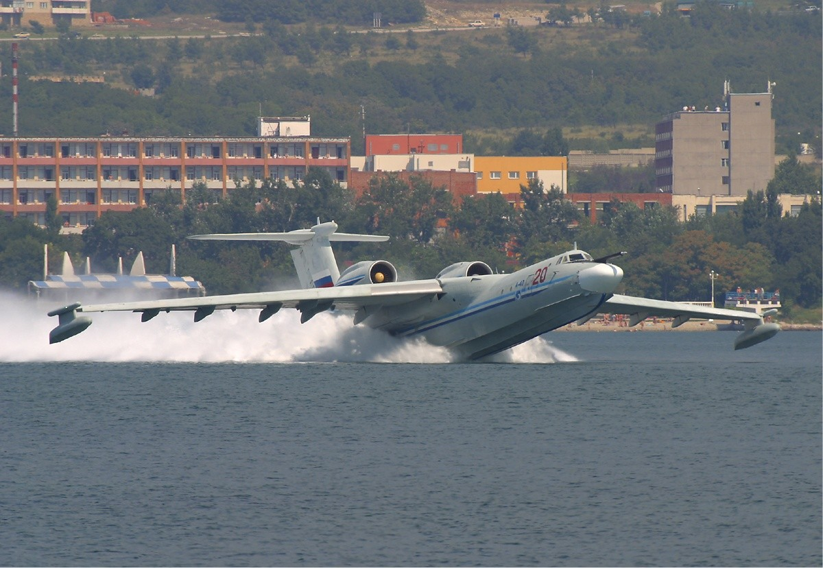 Beriev A-40 at Gelendzhik, 2 September 2004